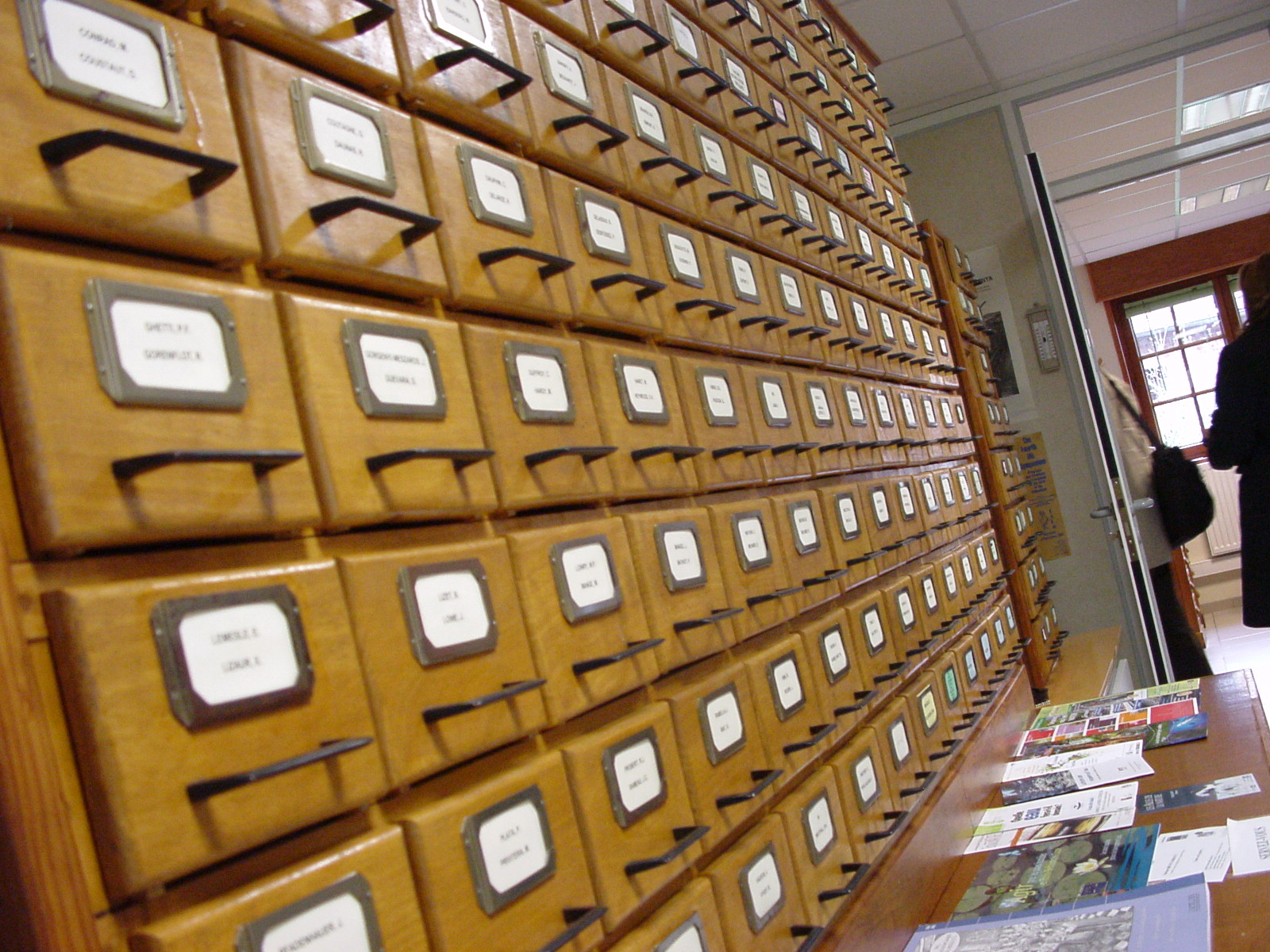 Conservatoire botanique national de Bailleul (CRP CBNB), fichier bibliothèqe